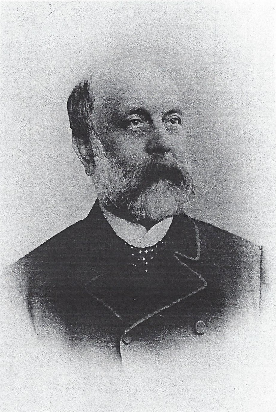 Porträtfotografie von Hermann Seul (1827-1902)